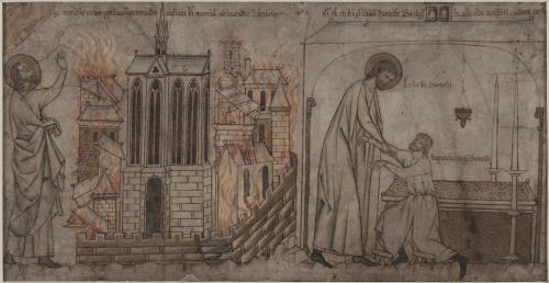 Saint-Eloi sauvant de l'incendie l'église Saint-Martial dans l'Île de la Cité et guérit un paralytique dans l'abbaye de Saint-Denis